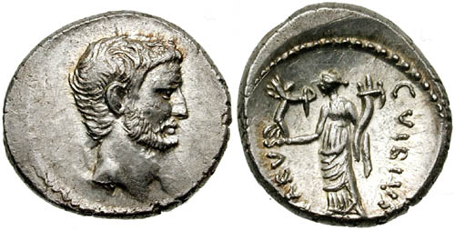 Marcus Antonius portrait. Denarius from 42 B.C.